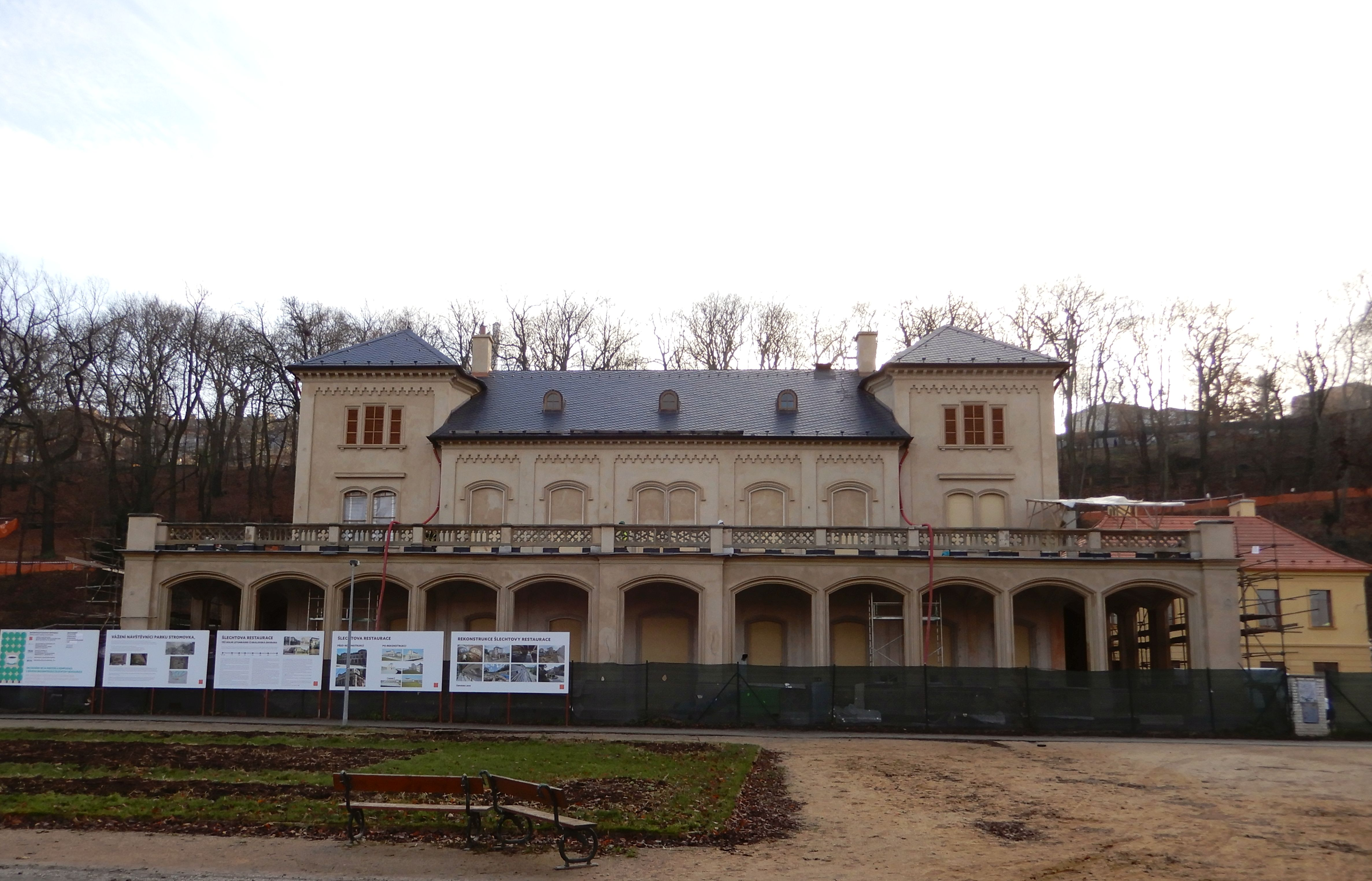 Šlechtova restaurace, Královská obora -stav- 12-2019